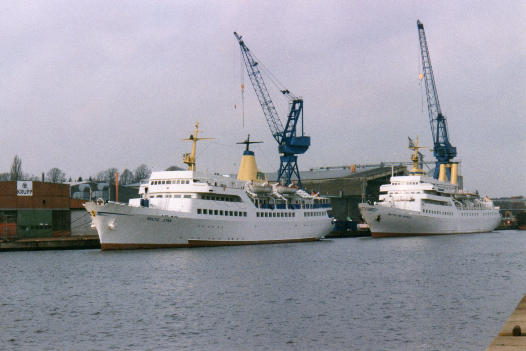 MS Baltic Star und MS Wappen von Hamburg Anfang 2000 in Lübeck